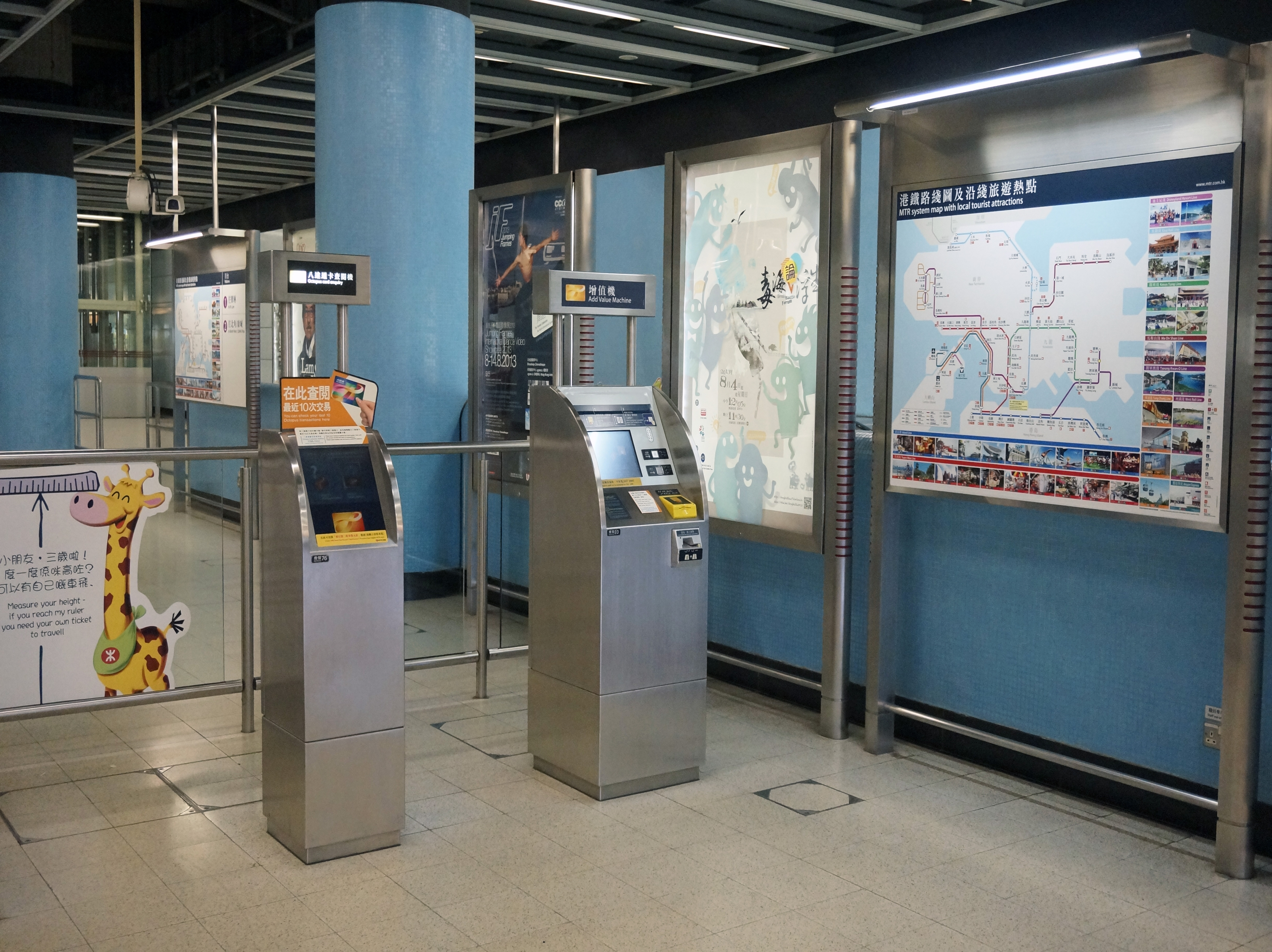 港鐵坑口站新款式的八達通增值機